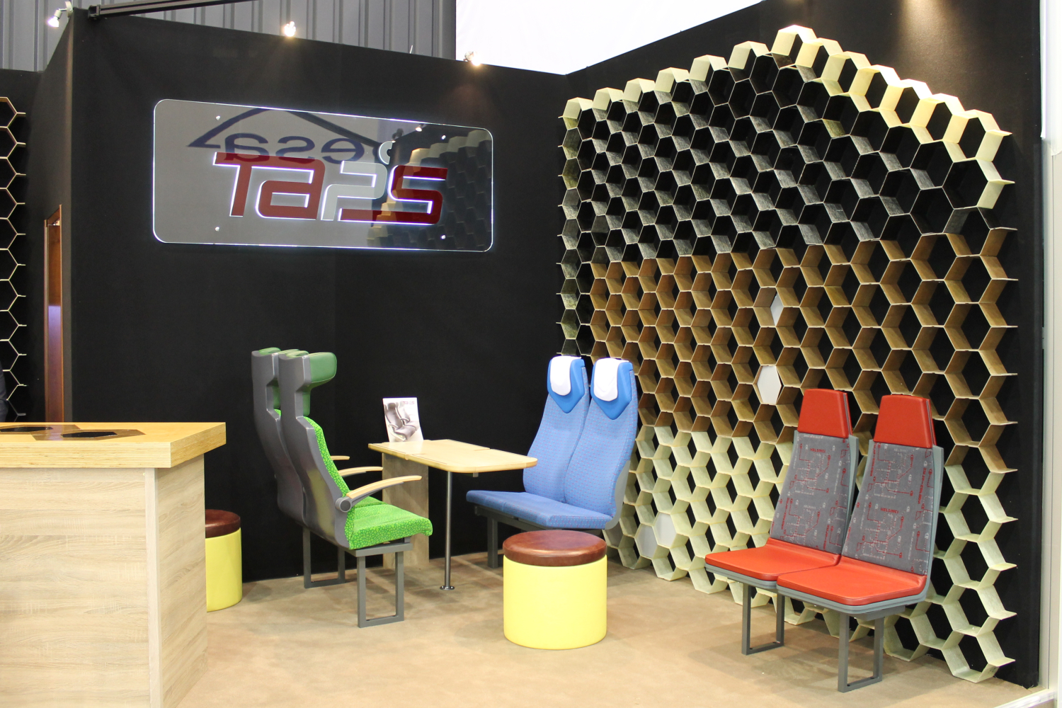 Fotele prezentowane na stoisku Taps podczas targów Trako 2015. The making of this document was supported by Wikimedia Polska Association, within Wikigrant no. WG 2015-34. English | polski | +/−